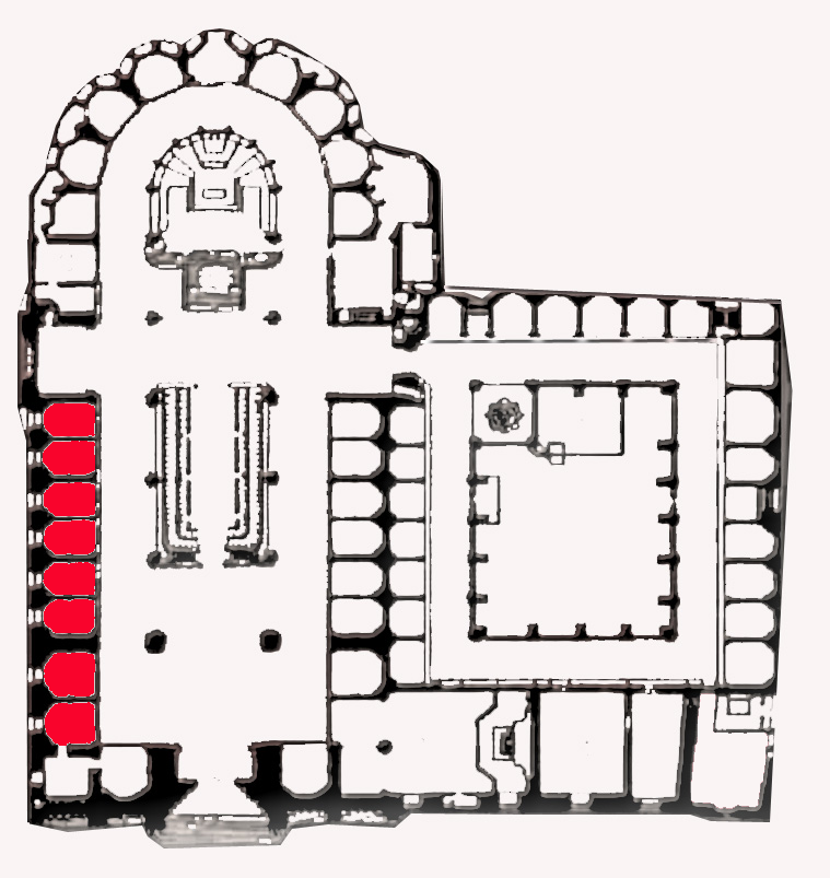 Situació de les capelles del costat de l'Evangeli dins de la catedral de Barcelona